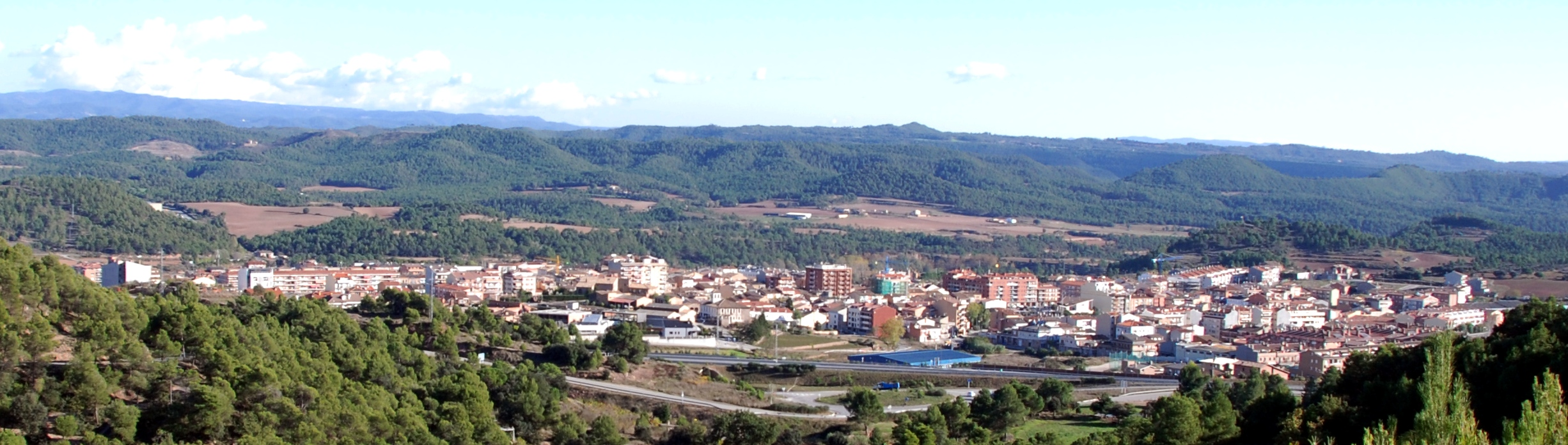 Vista de Navàs